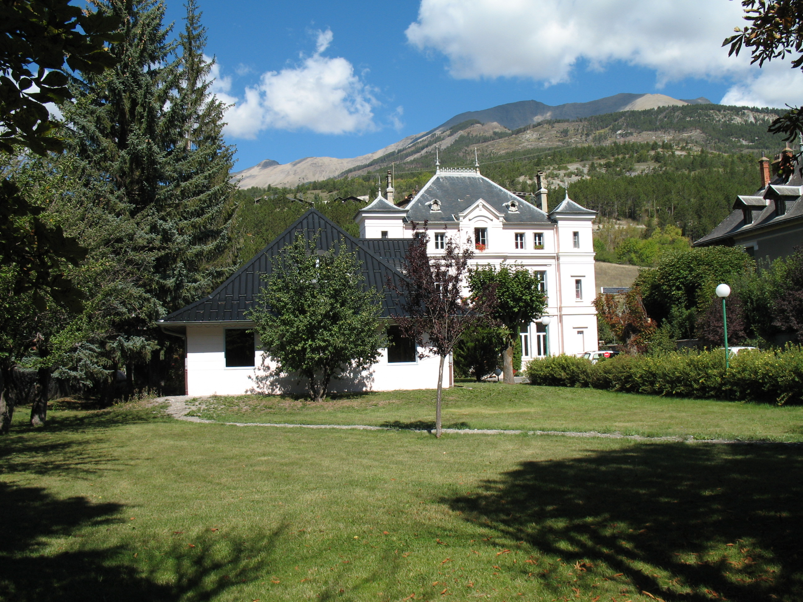 Barcelonnette, département des Alpes-de-Haute-Provence, France